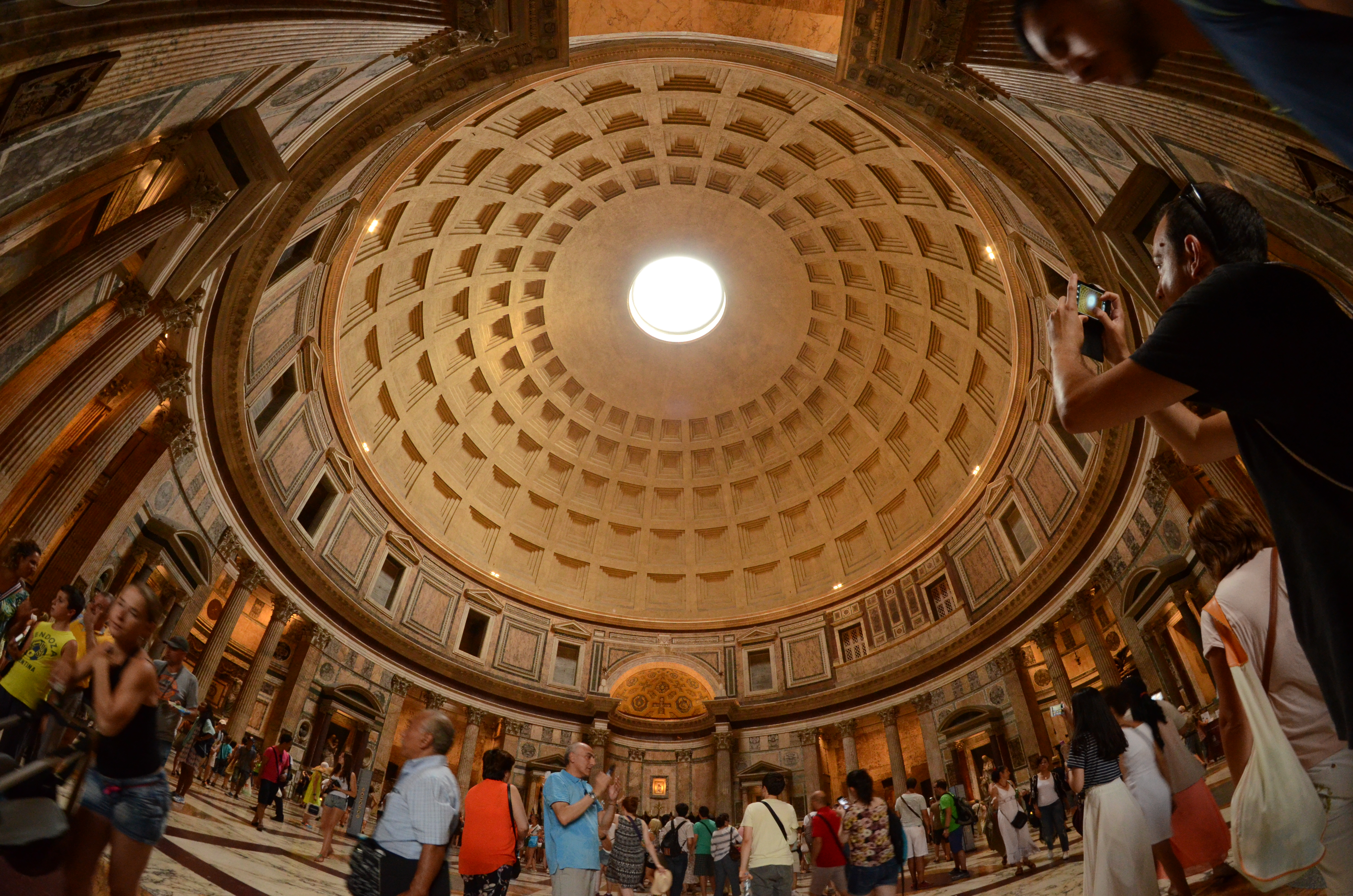 De binnenzijde van het Pantheon.